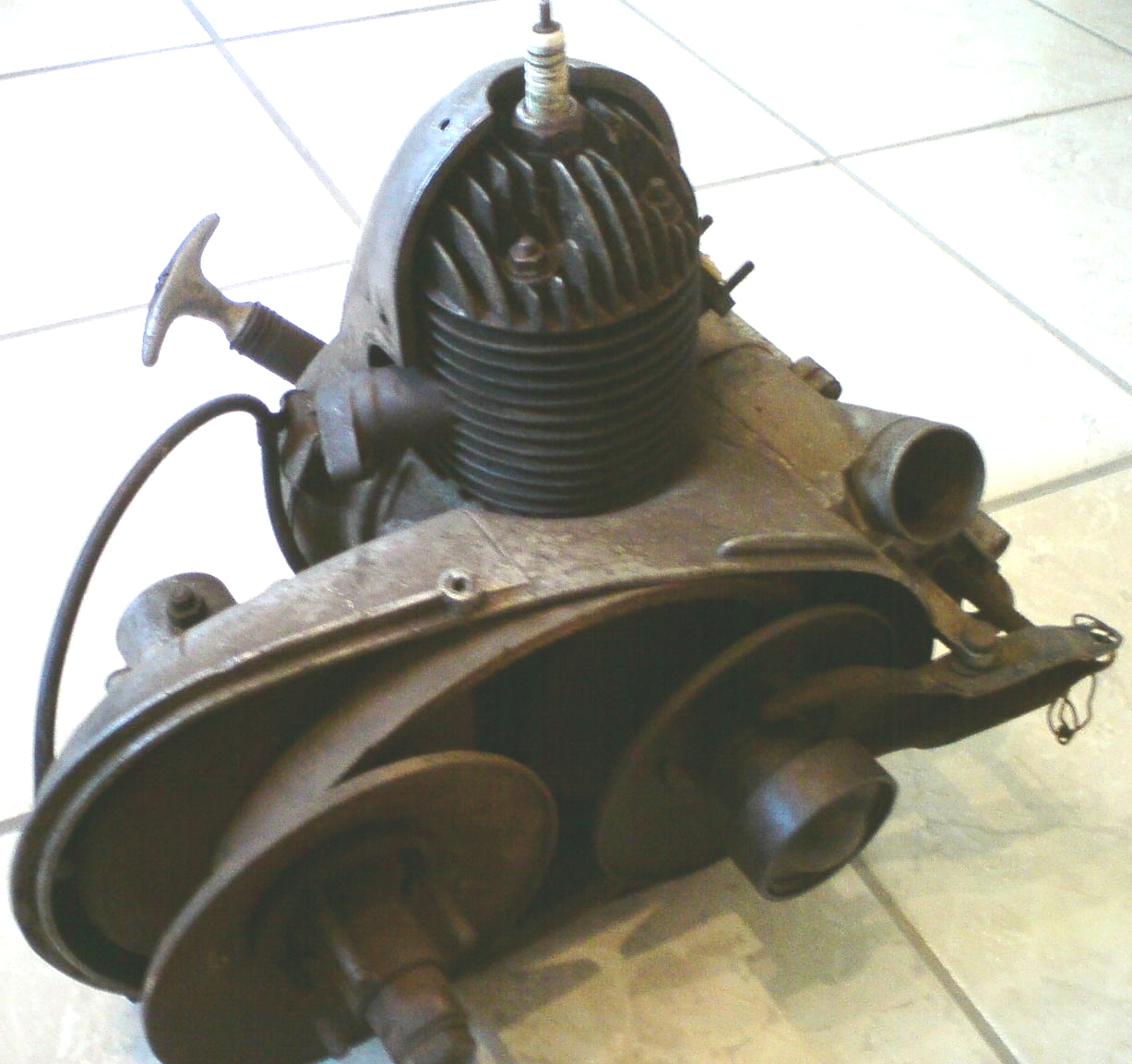 Motor einer DKW Hobby Baujahr 1955 mit Automatik-Getriebe "System Uher"